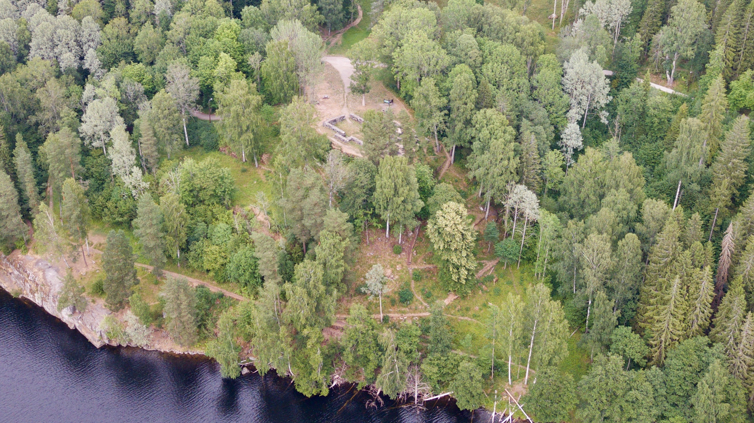 Sarabråten i Østmarka i Oslo.